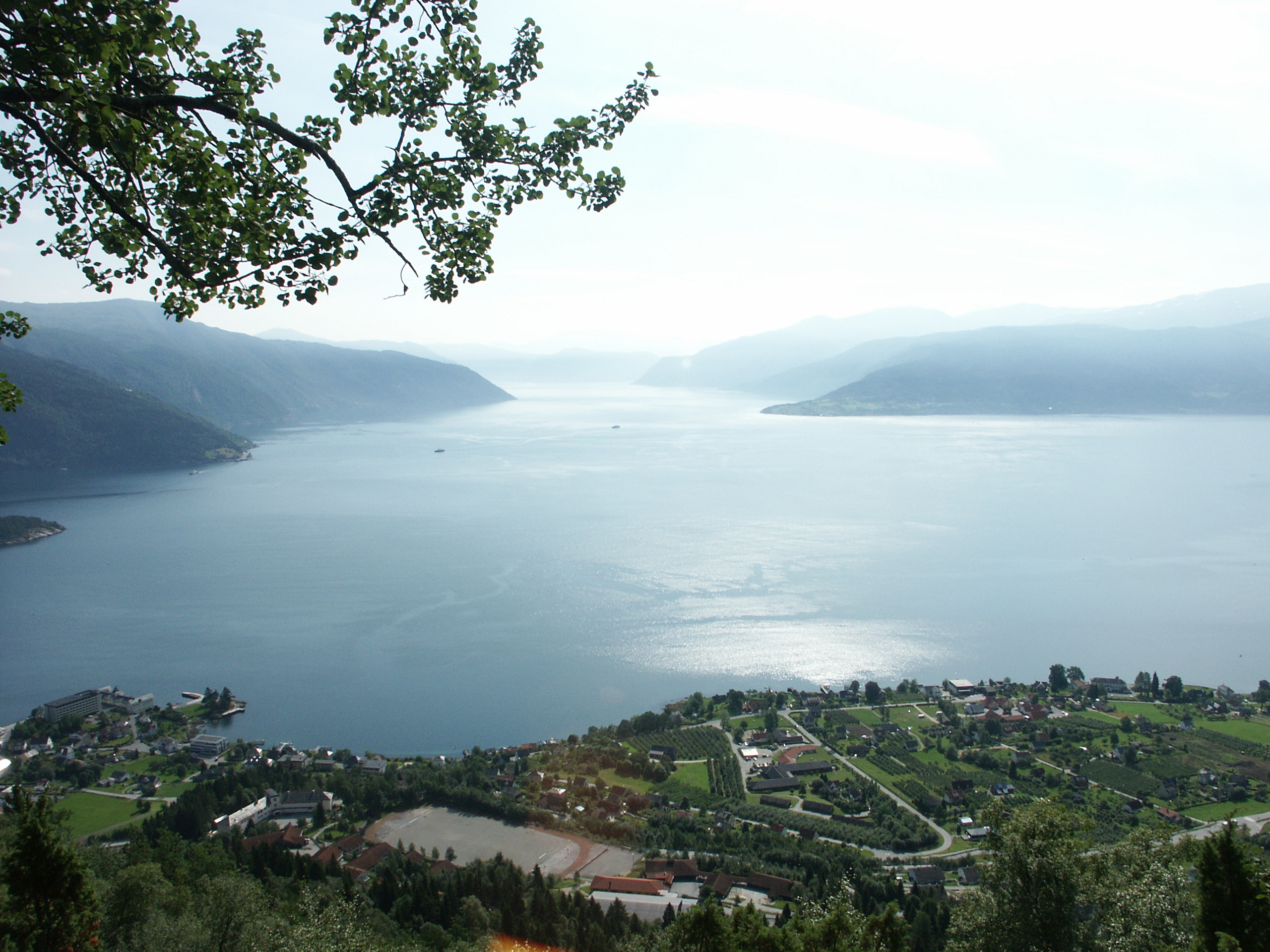 Kommunesenteret Holmen i Balestrand kommune. Ferjene på fjorden er på veg mellom Vangsnes i Vik kommune, Hella i Leikanger kommune og Dragsvik i Balestrand kommune.